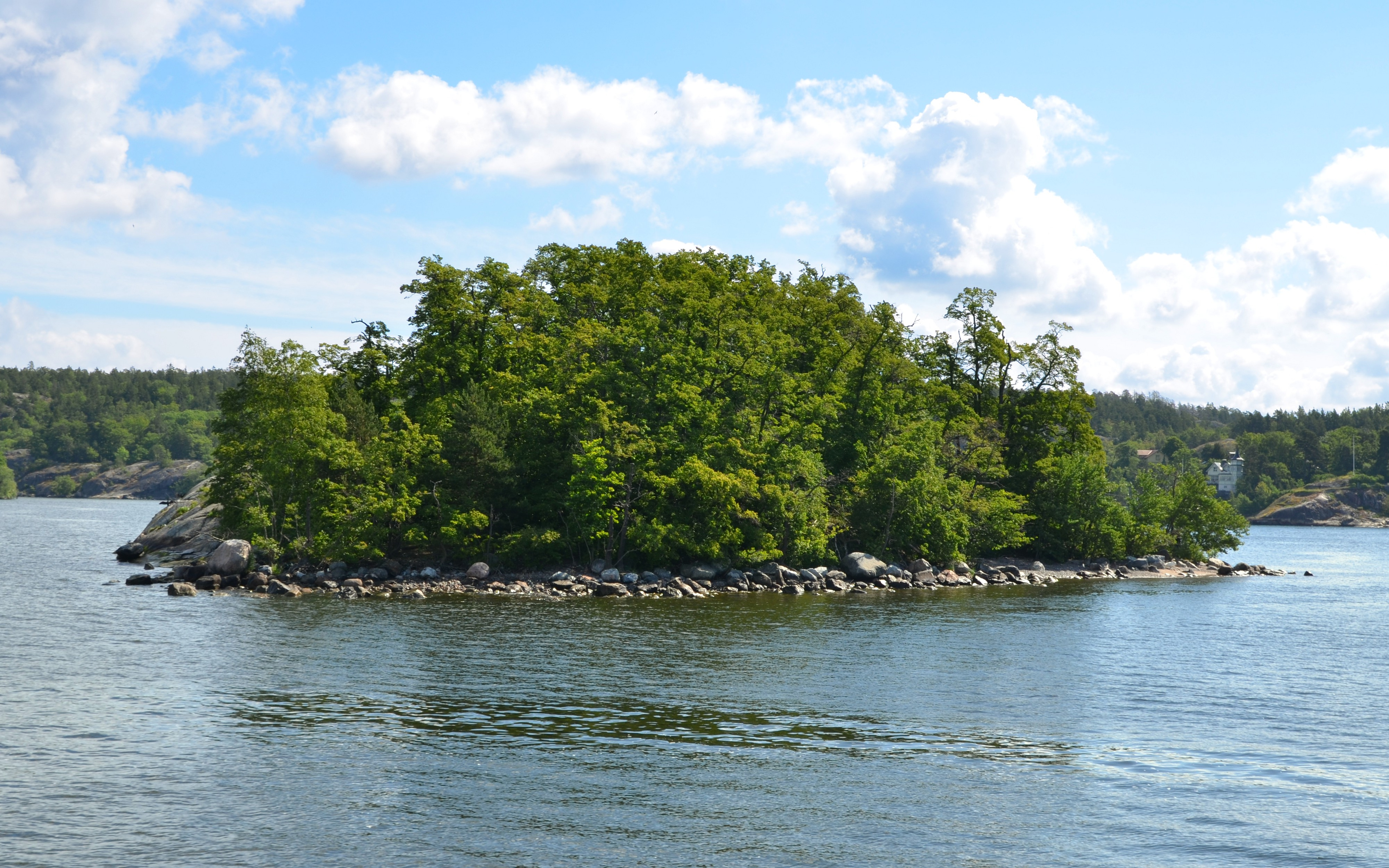 Sveriges holme i norra änden av Skurusundet.